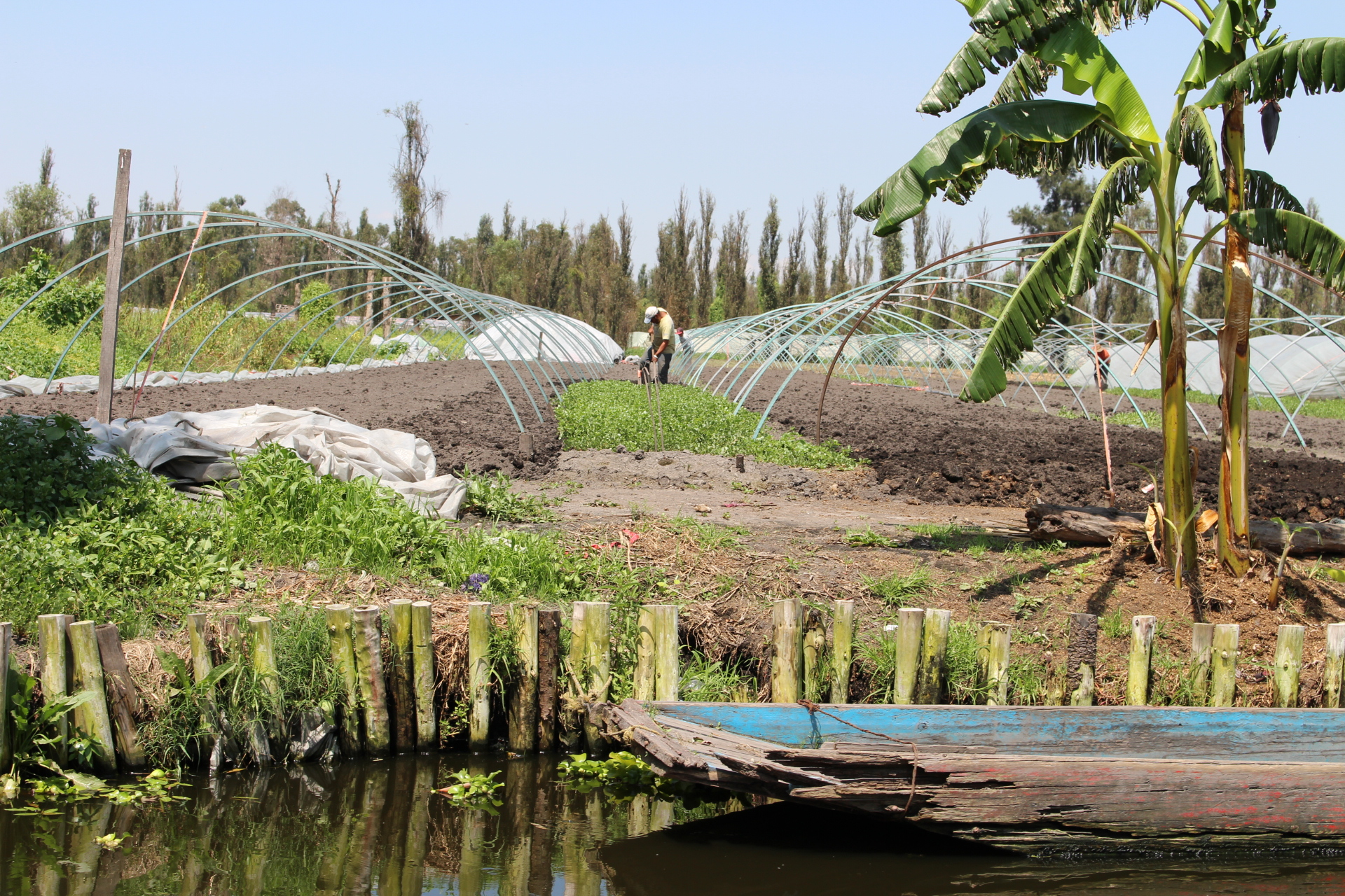 Hombre preparando la tierra para sembrar.